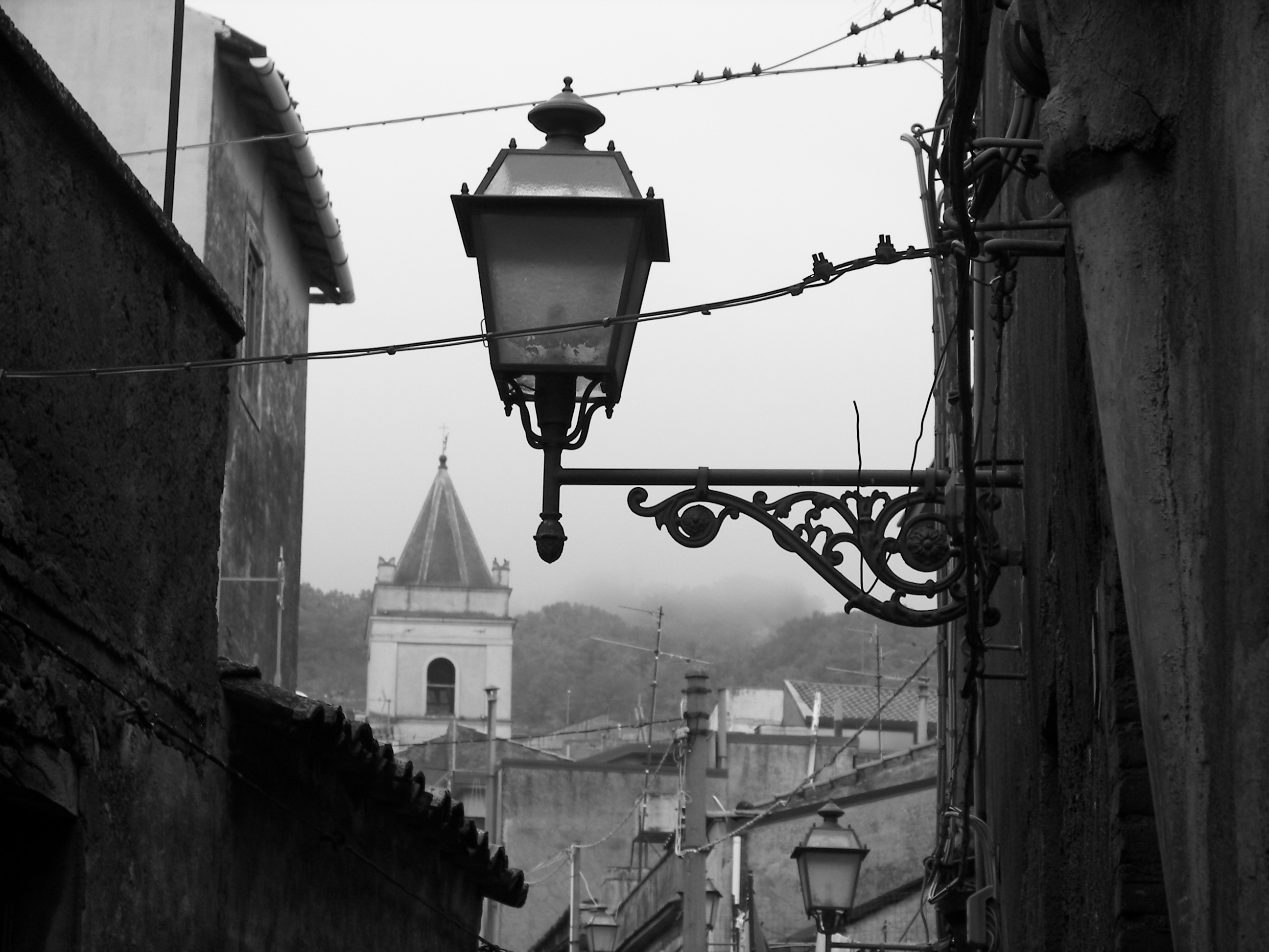 Maletto, comune in provincia di Catania; scorcio del campanile di San Michele.